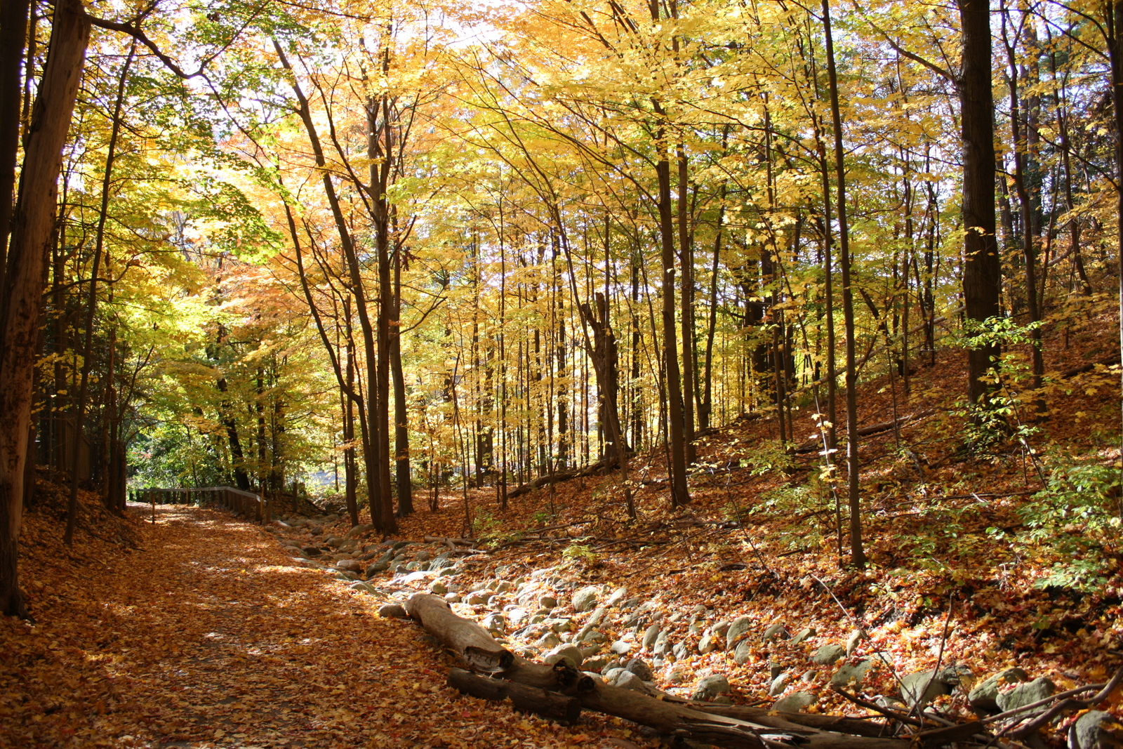 West Don Parkland